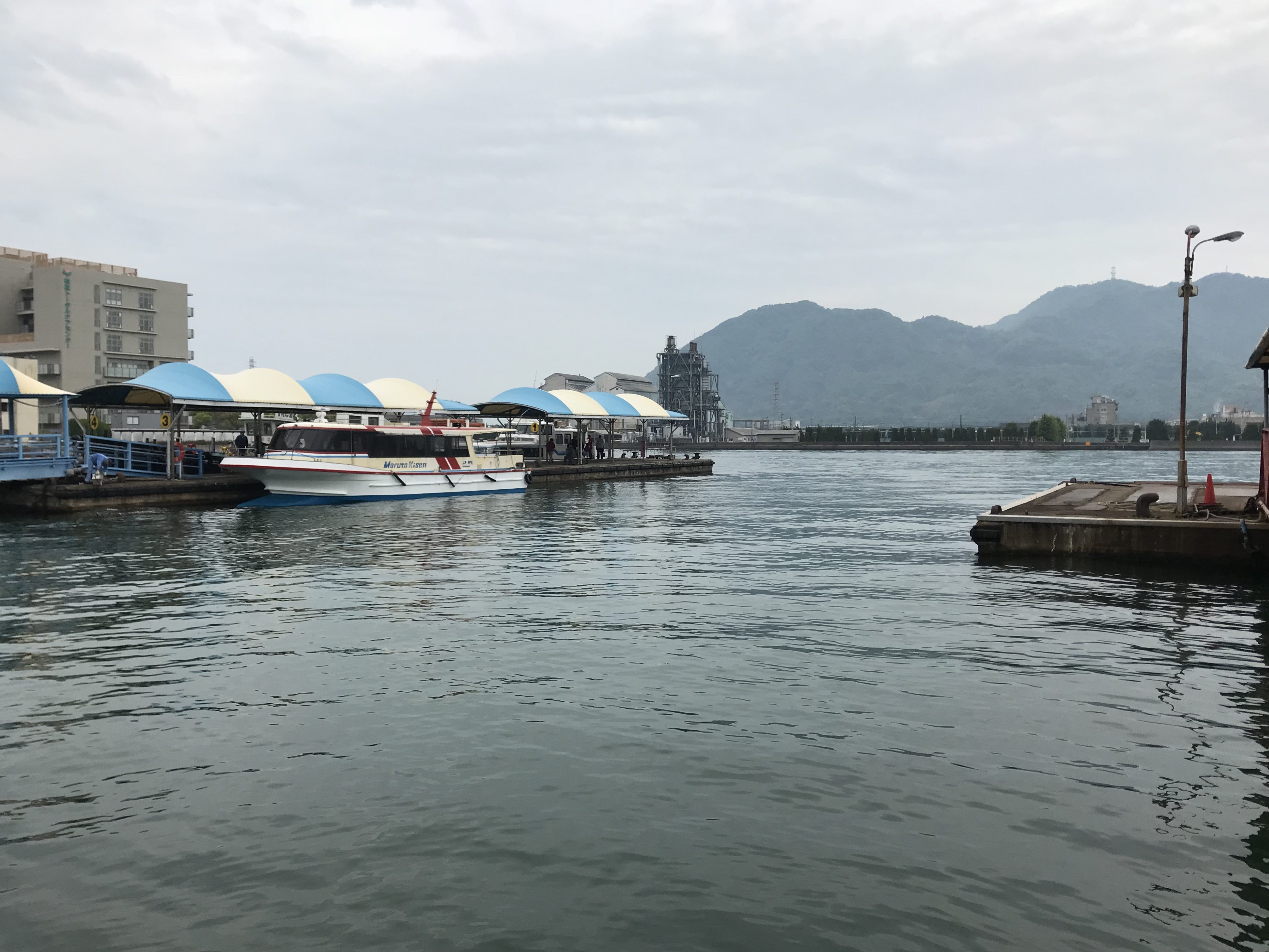 三原港と筆影山